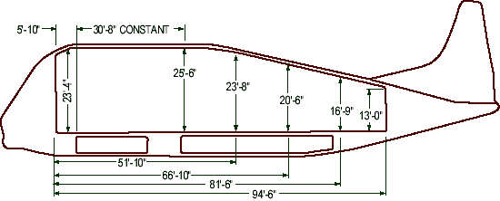 Boeing 377 Supper Guppy Andere Versionen